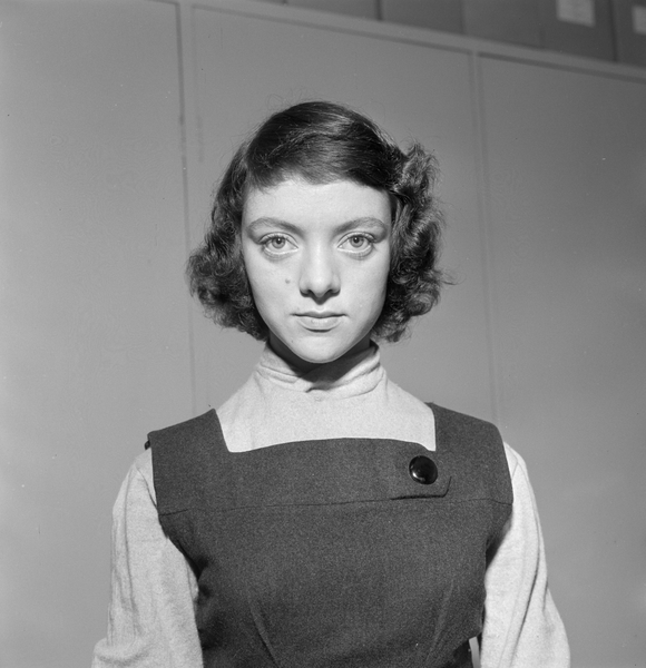 Den norska skådespelerskan Marit Bolling som Anne Frank på Folketeatret 1956.